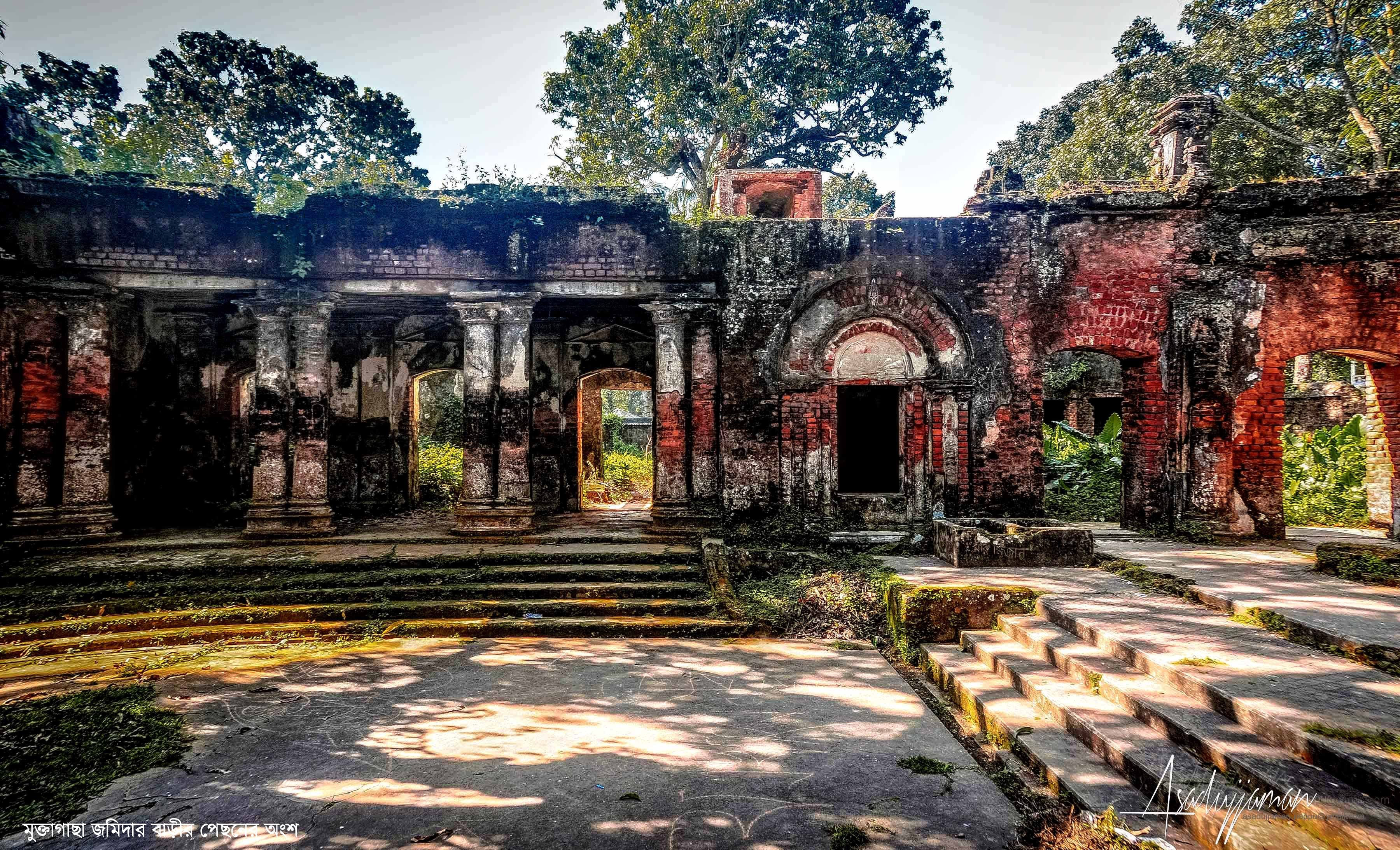 শশীকান্ত প্রাসাদের সম্মুখ প্রান্ত থেকে তোলা ছবি